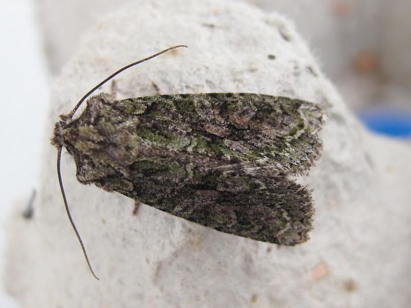 Eikenuiltje (Dryobotodes eremita)